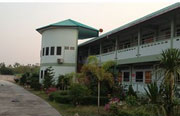 อาคาร-9